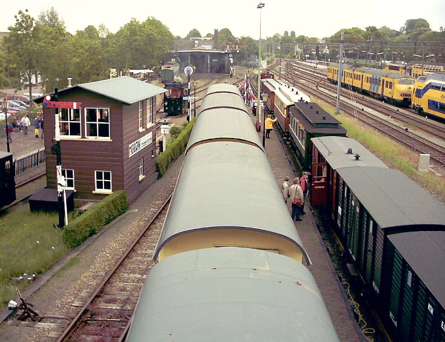 Emplacement van de Museumstoomtram Hoorn-Medemblik (SHM), 27 mei 2006. Eigen foto, bij deze in het publiek domein geplaatst.